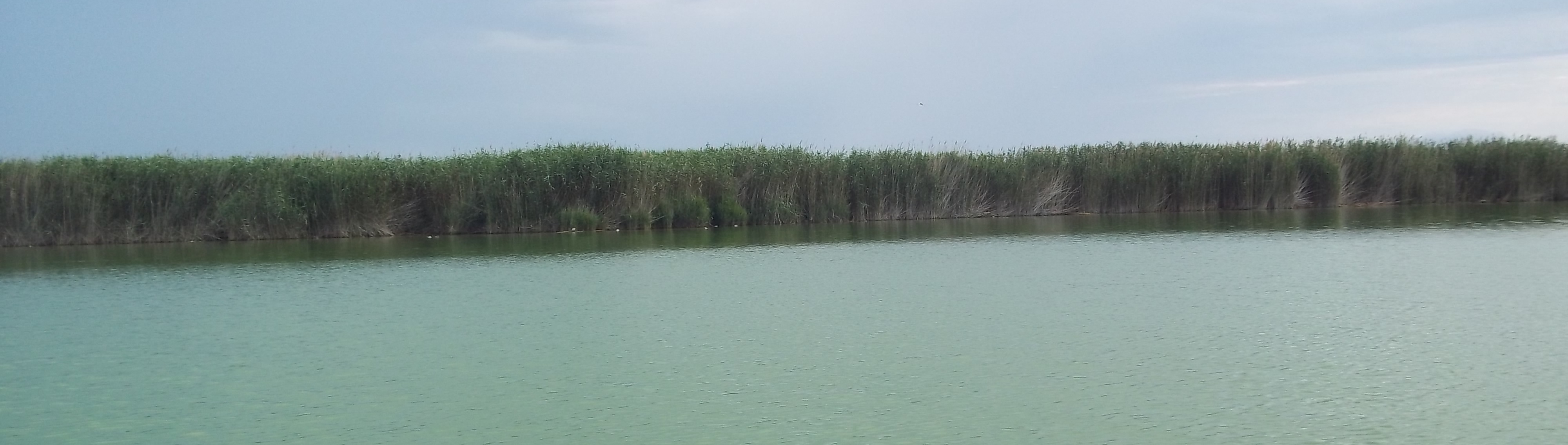 Mata del Fang i Racó de l'Olla a l'Albufera de Albufera de València